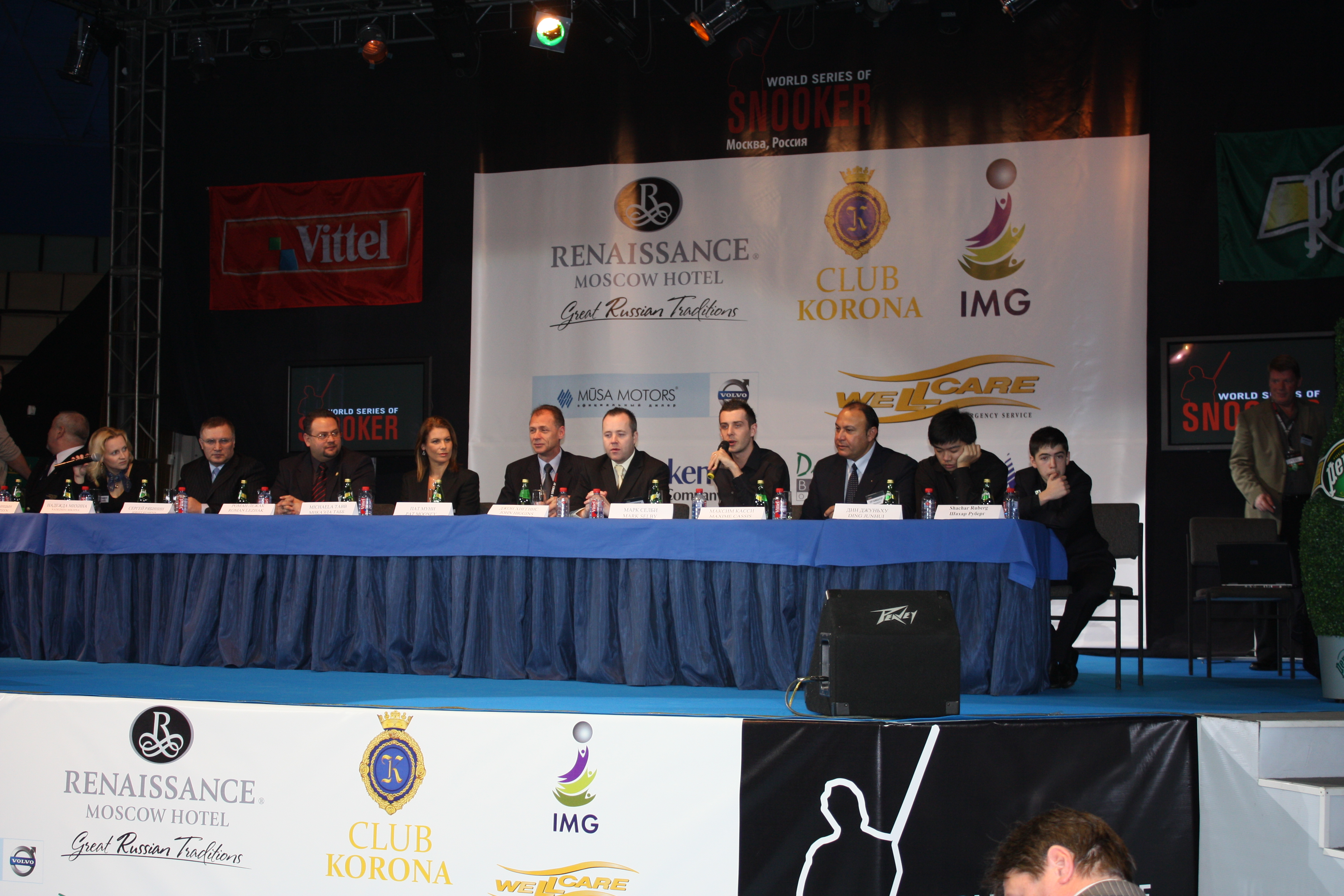 Туринир World Series of Snooker в Москве